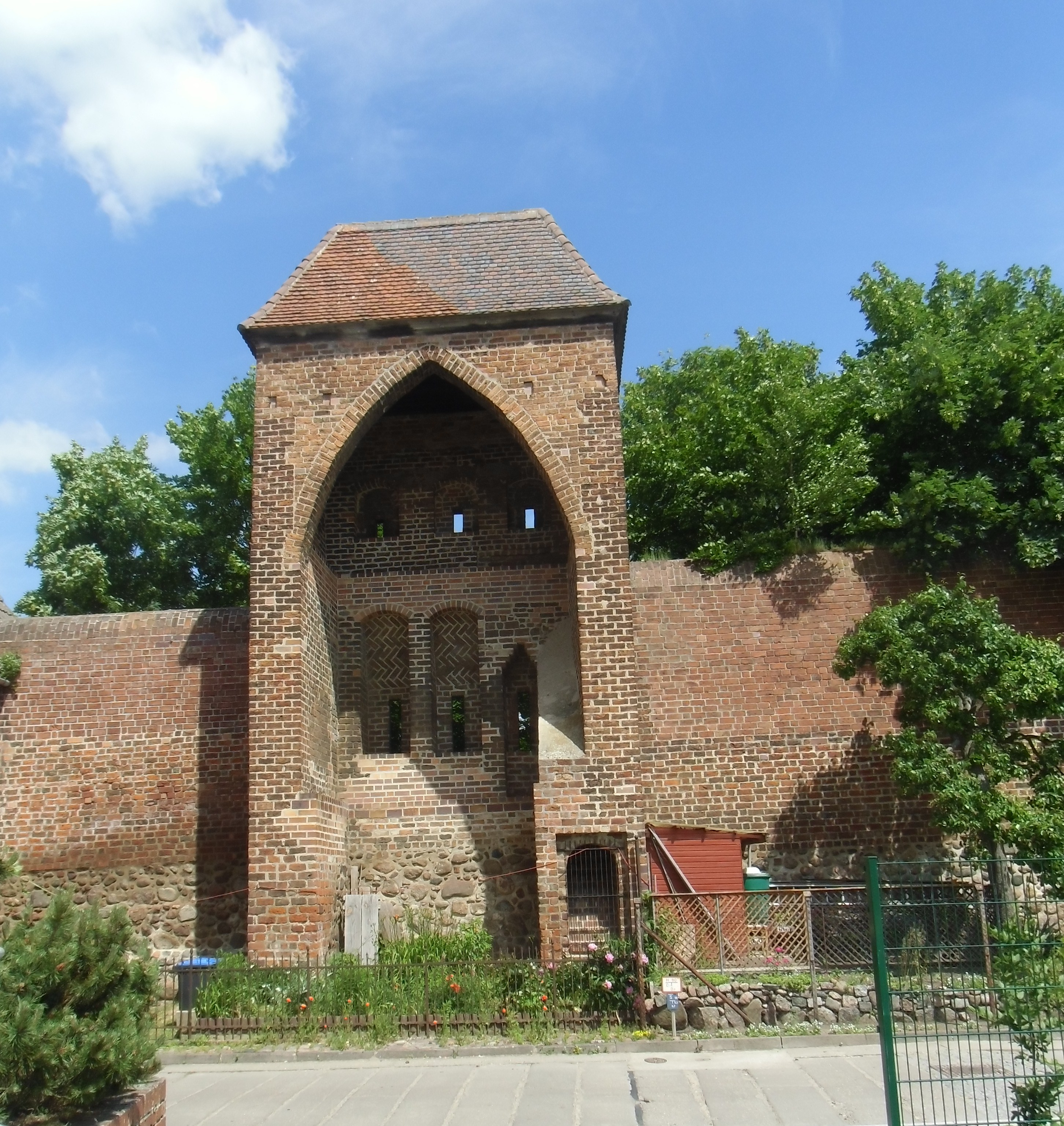 Wiekhaus, Teil der denkmalgeschützten Stadtmauer von Prenzlau